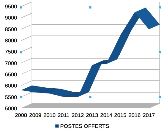 Recrutement CAPES, Postes offerts de 2008 à 2017. Ces chiffres prennent en compte le CAPES externe, le CAPES interne et le concours réservé (Sources Ministère de lEducation Nationale)